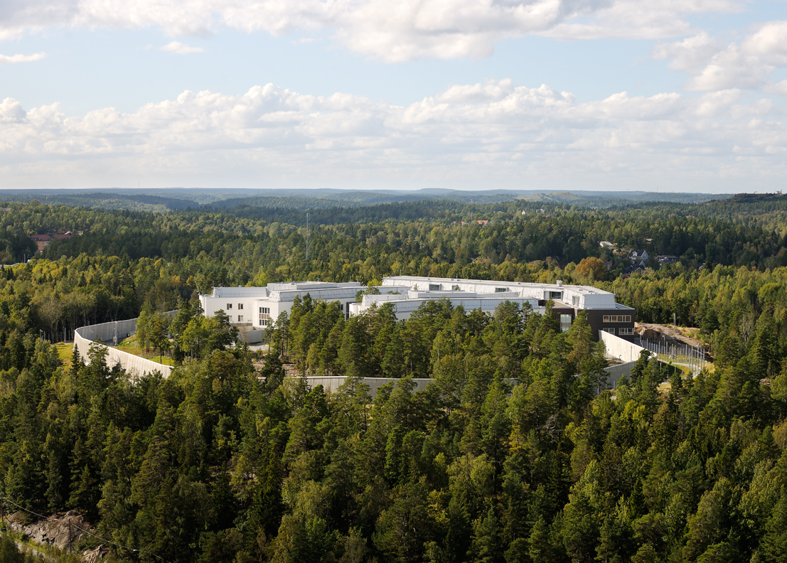 Helix är en vårdbyggnad i kvarteret Kromosomen vid Alfred Nobels allé 41 i Flemingsberg, Huddinge kommun. Byggnaden är specialritad för Rättsmedicinalverkets verksamhet Rättspsykiatri Vård Syd och tilldelades år 2013 utmärkelsen Årets Bygge